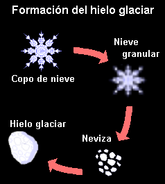 Autor: Usuario:Lmb